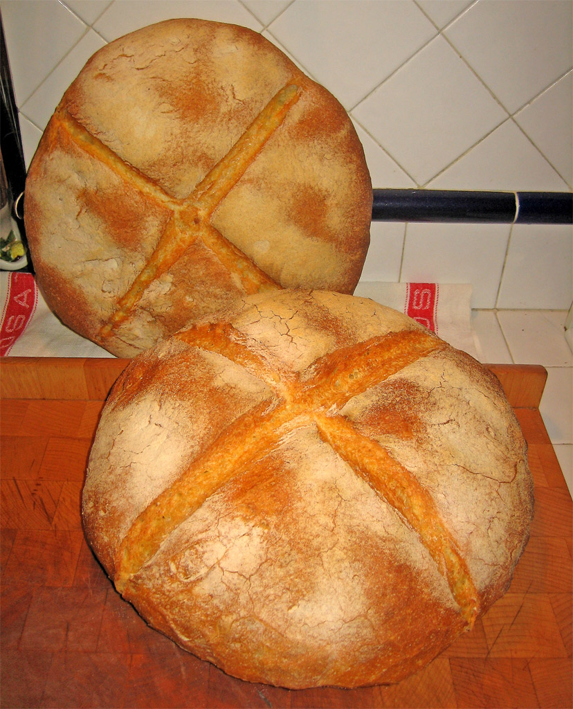 l'intera produzione ricetta/recipe sul mio blog